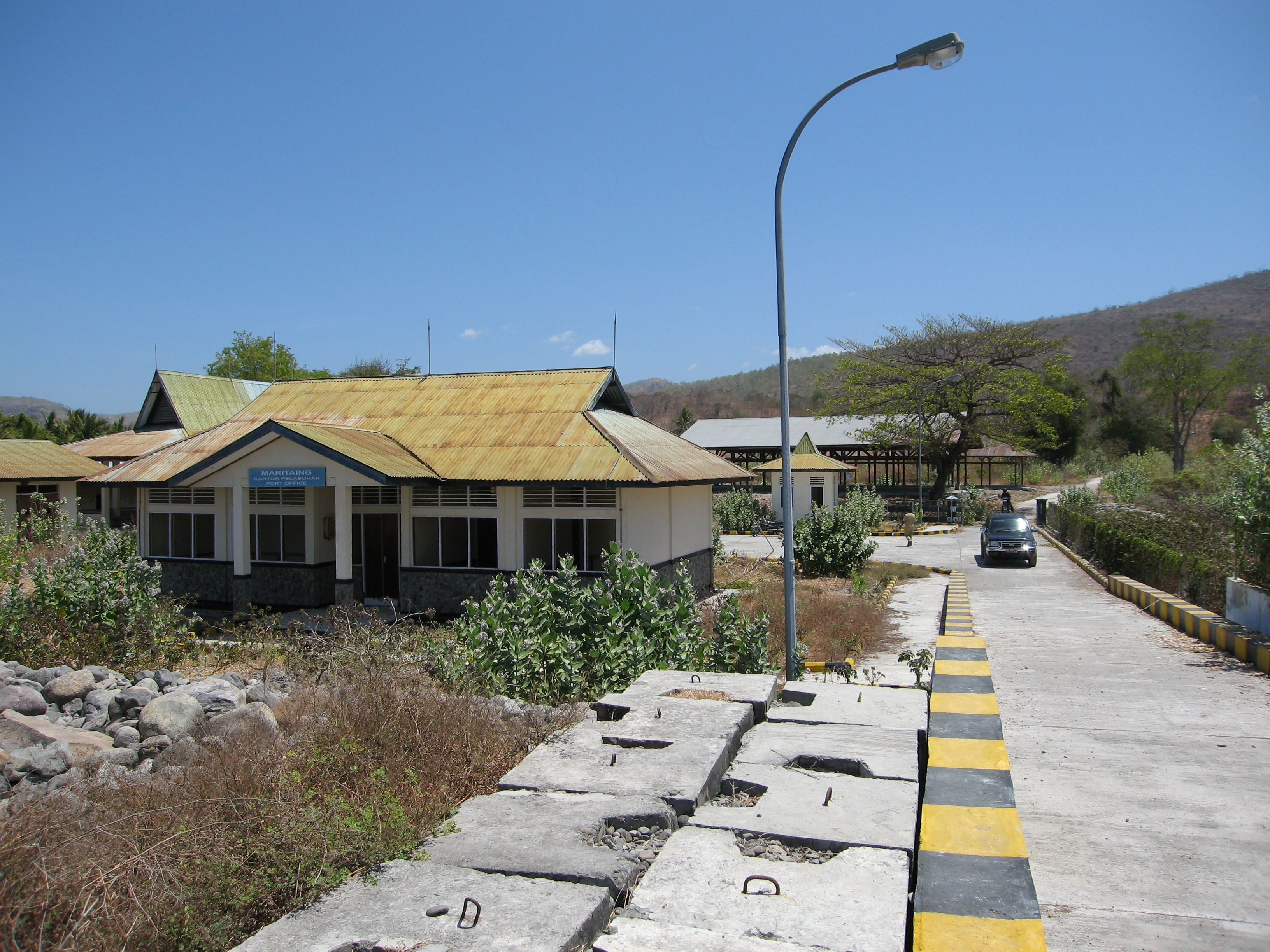 Kantor Pelabuhan, Maritaing, Kab Alor, NTT